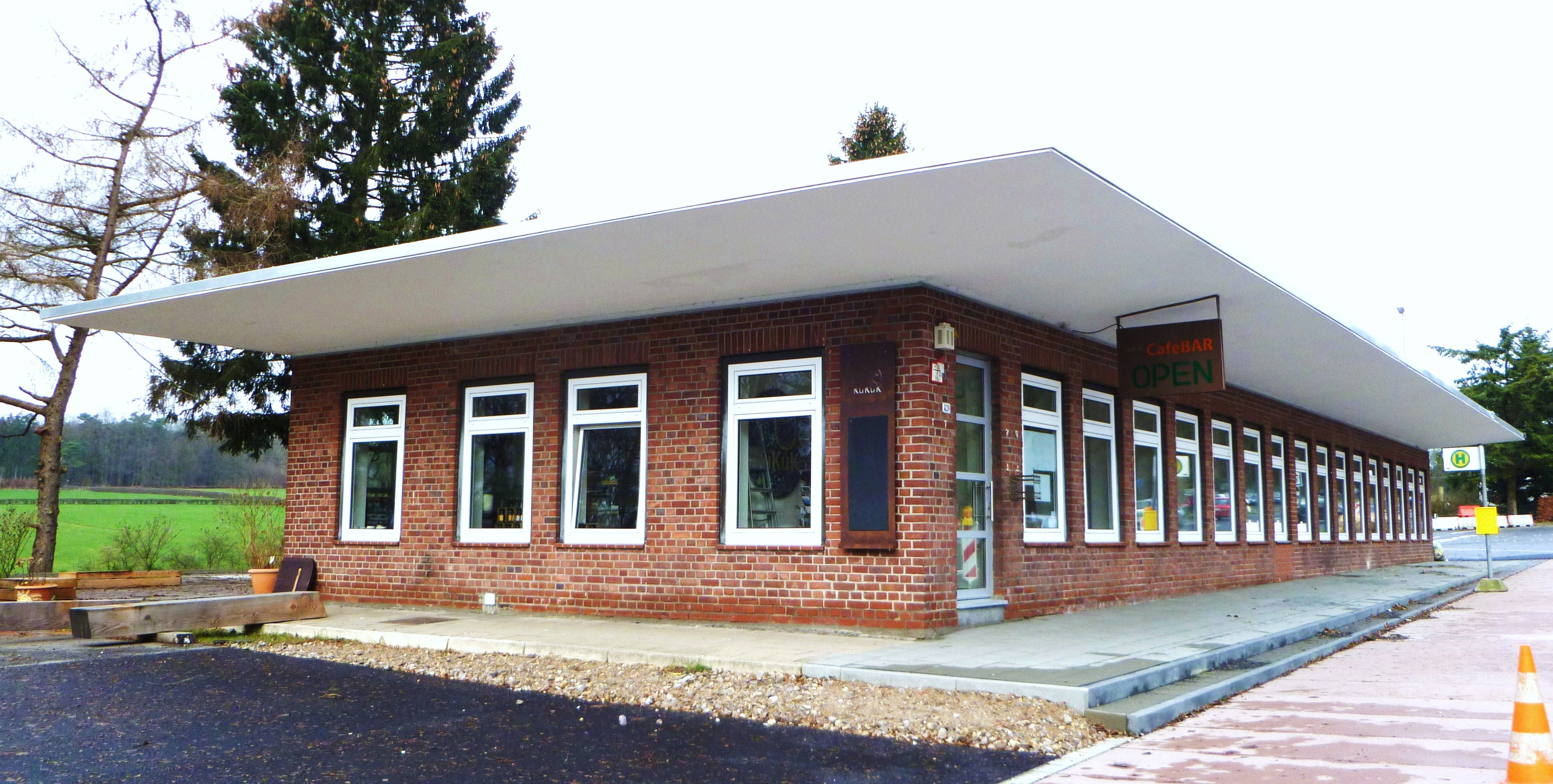 Baudenkmal in Aachen-Mitte